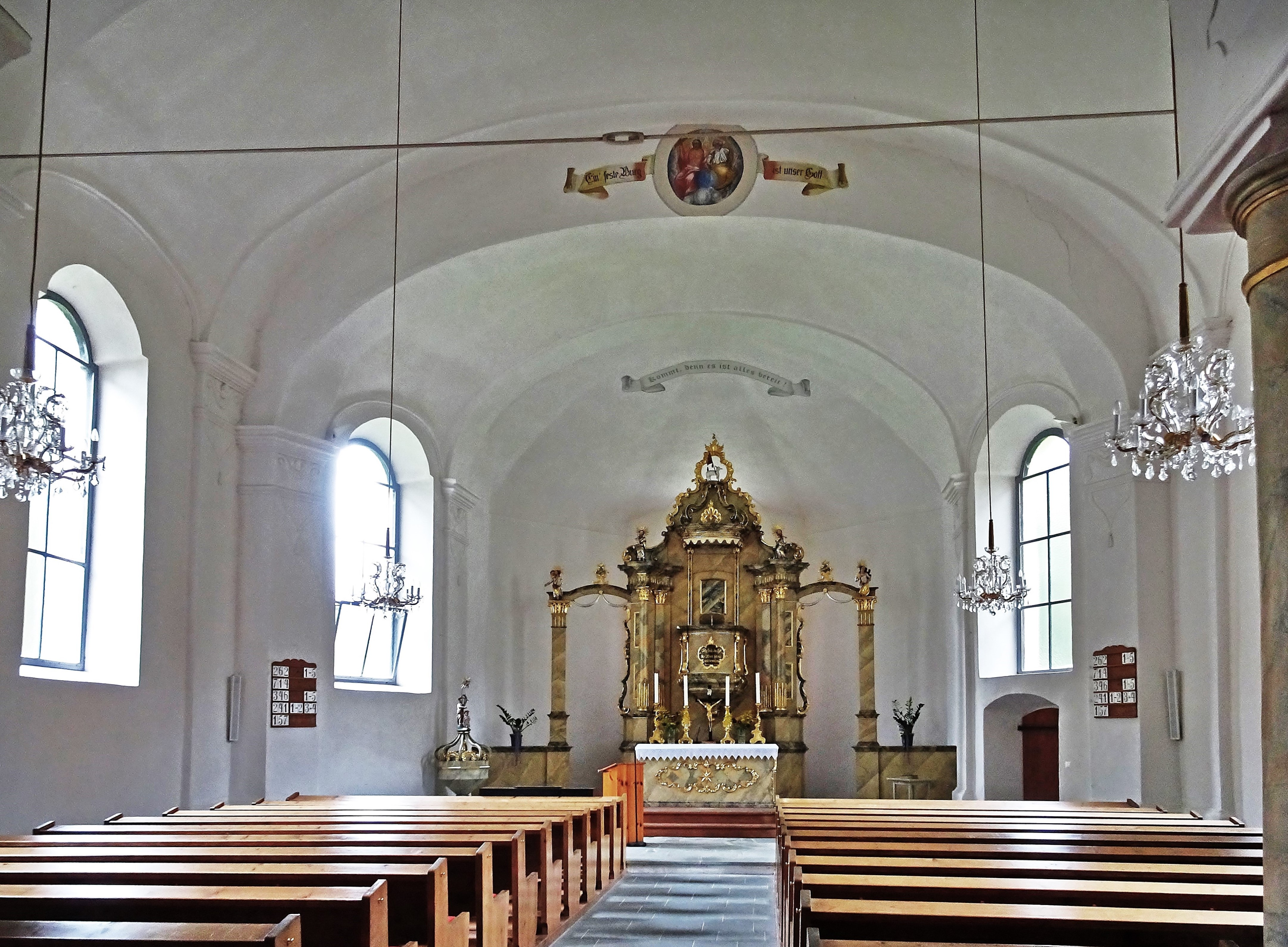 Evang. Pfarrkirche Eisentratten, Krems in Kärnten, Innenansicht